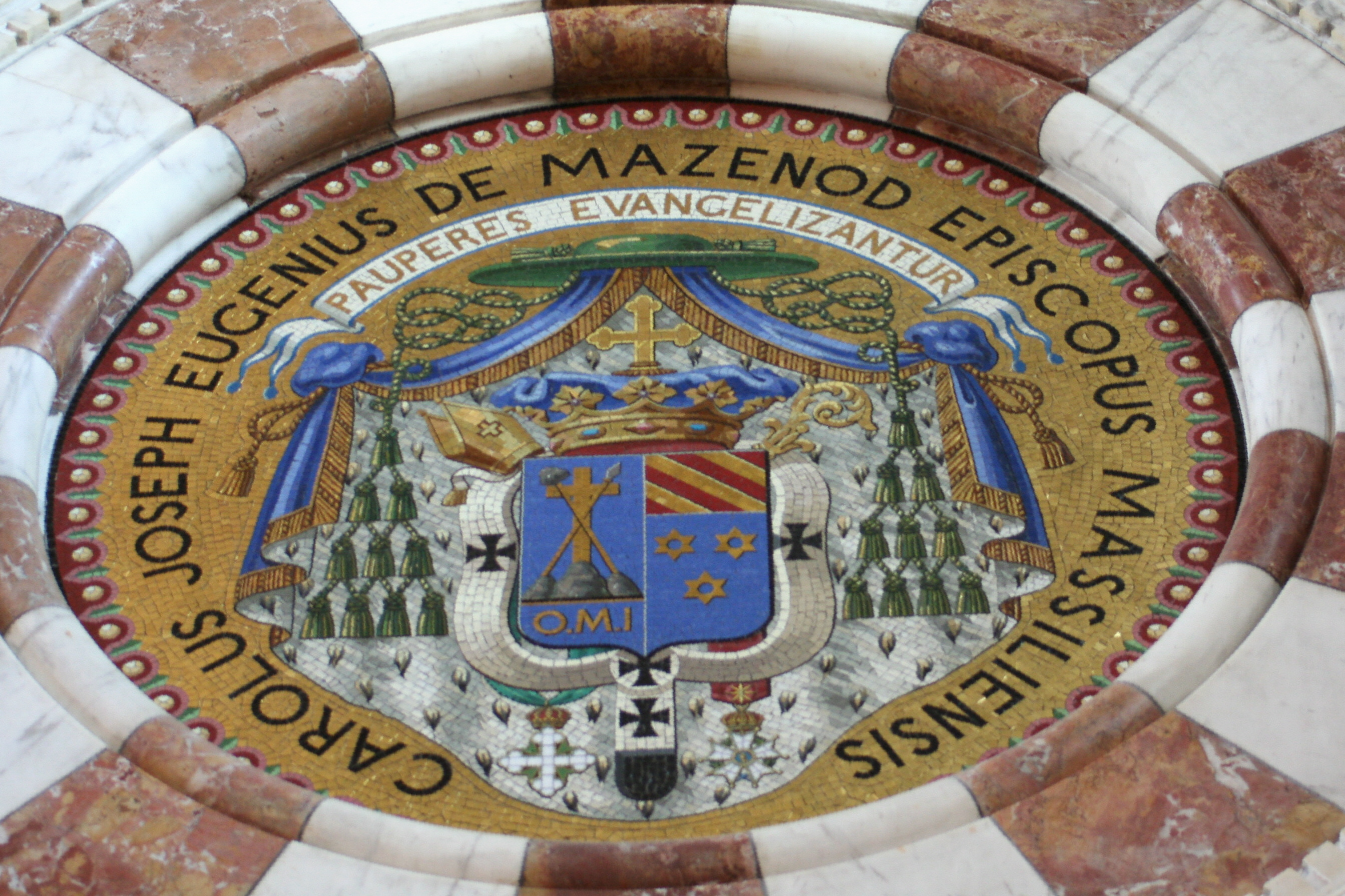 Ecusson de Monseigneur de Mazenod à l'intérieur de la basilique Notre-Dame de la Garde à Marseille.